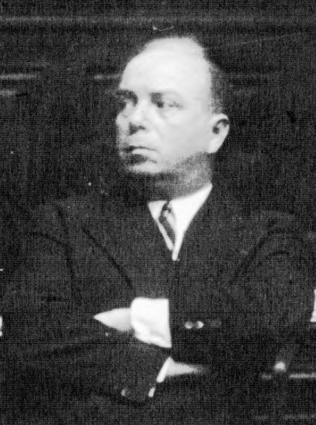 Horace de Carbuccia (cropped version of Affaire Bonny ou Bony - Carbuccia : Melle Cotillon).